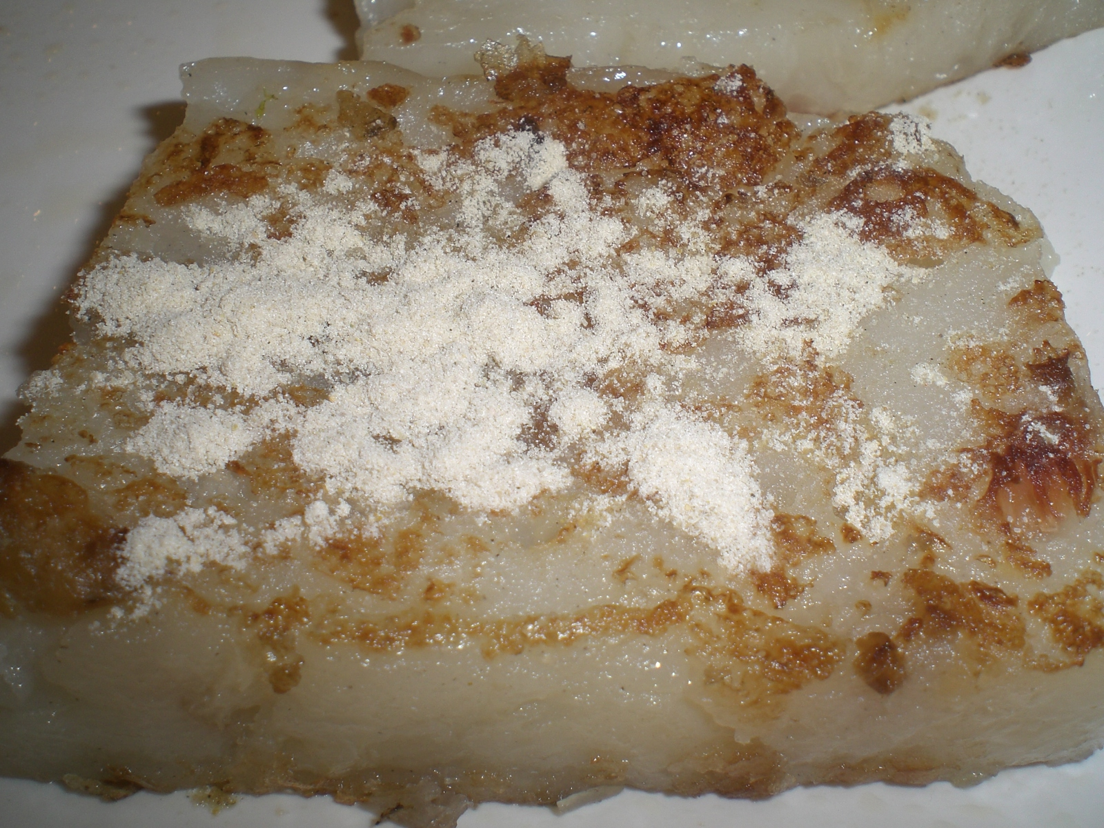 Meeresfrüchte in einem Chinesischen Teehaus